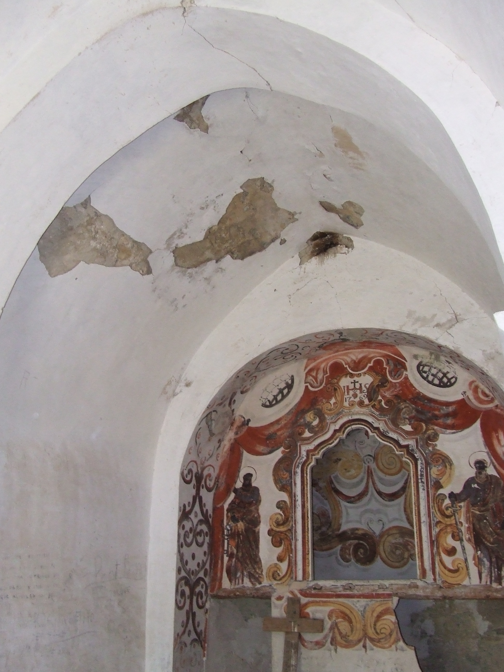 Interior de Sant Serni de Montesquiu (Orcau, Isona i Conca Dellà, Pallars Jussà), amb pintures murals barroques.